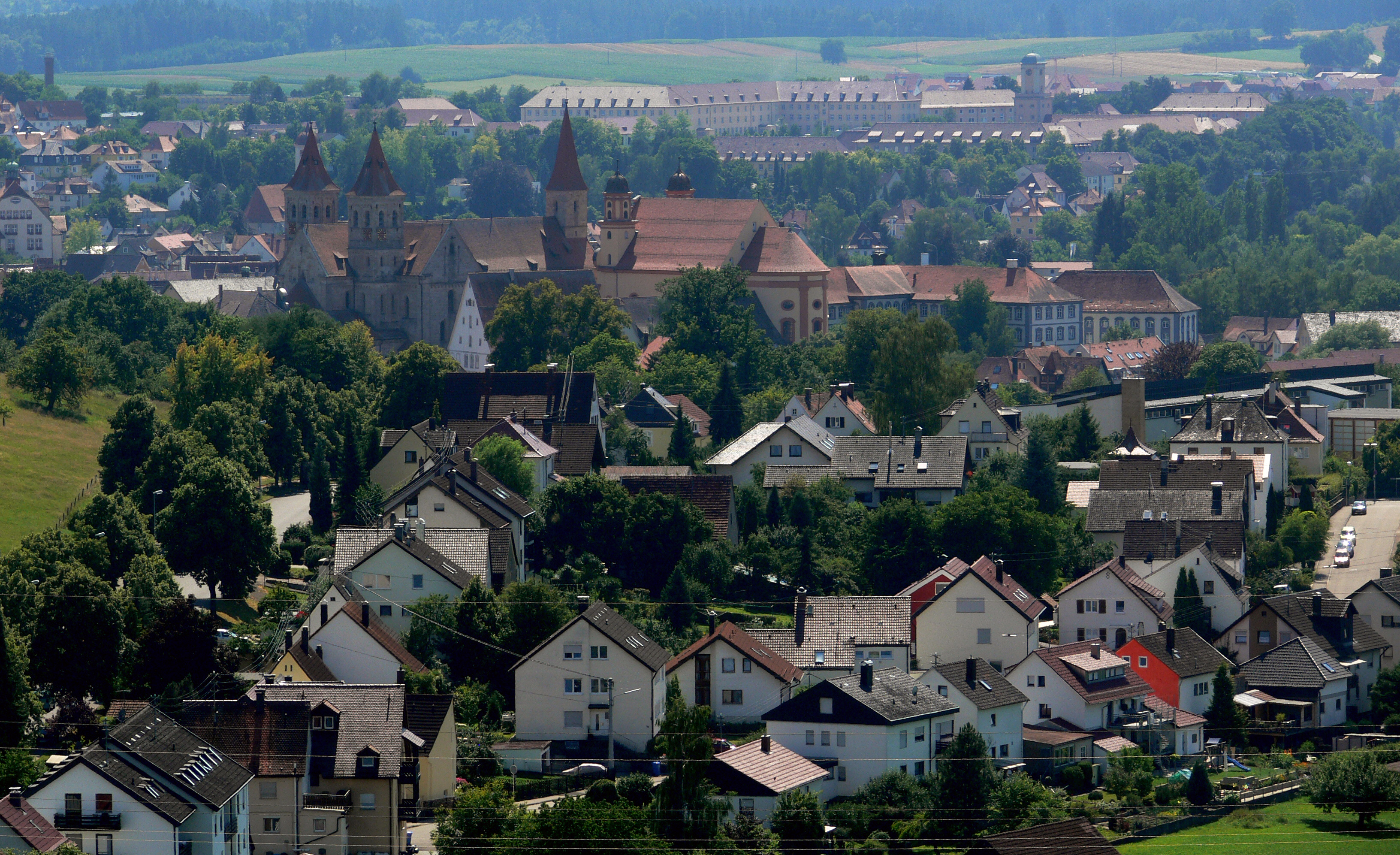 Blick vom Schönenberg auf Ellwangen (Jagst)